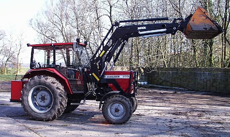 Massey Ferguson 273 mit Frontlader